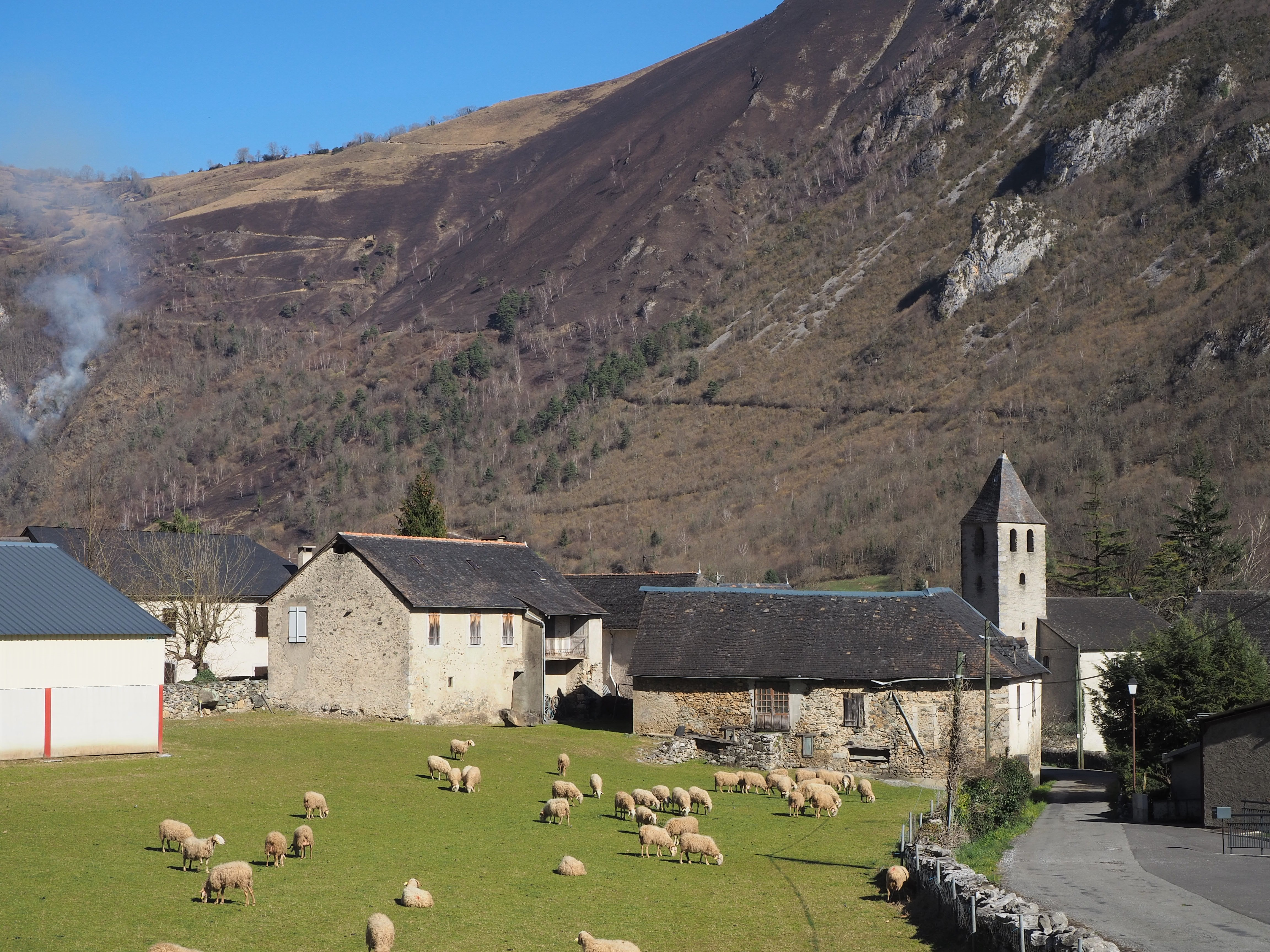 Le village de Bélesten, dans la commune de Gère-Bélesten.